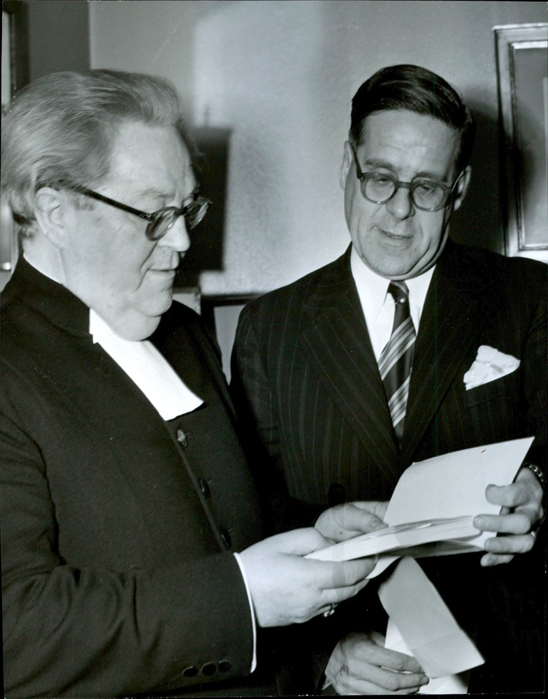 Bildtext 1951: "Isaac Béen visar sin bok för dir. Sven Löfberg." Bilden infördes i Svenska Dagbladet 1951-11-24 sid 11 (